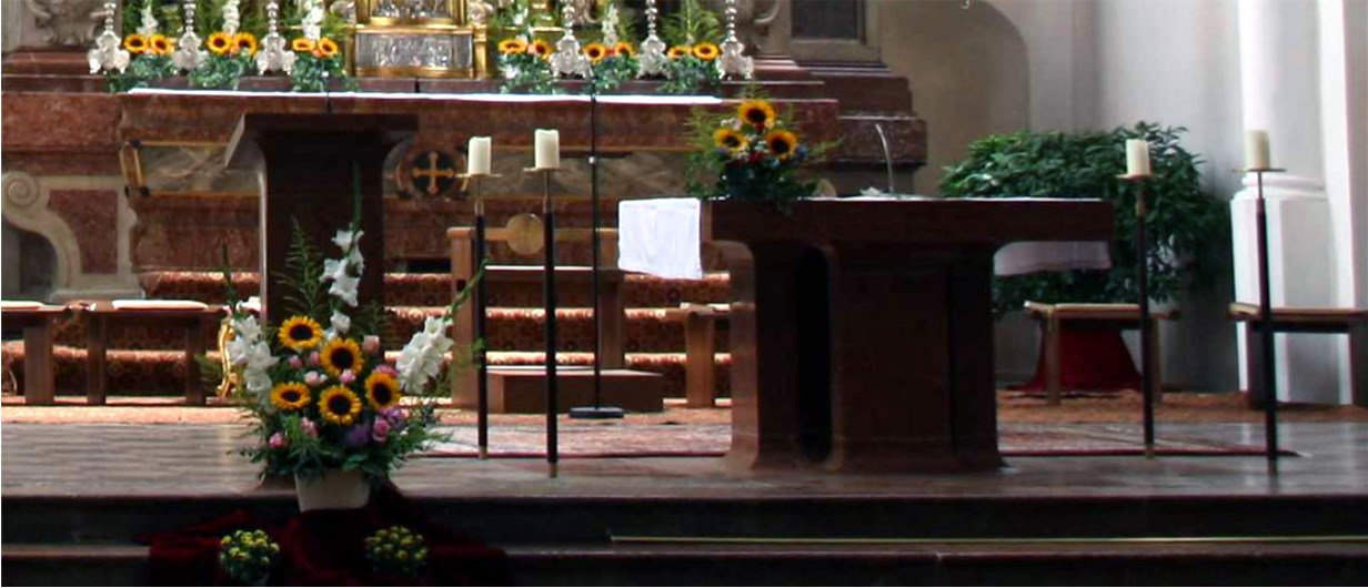 Hauptaltar und Ambo der Stiftskirche Berchtesgaden im gleichen Stil